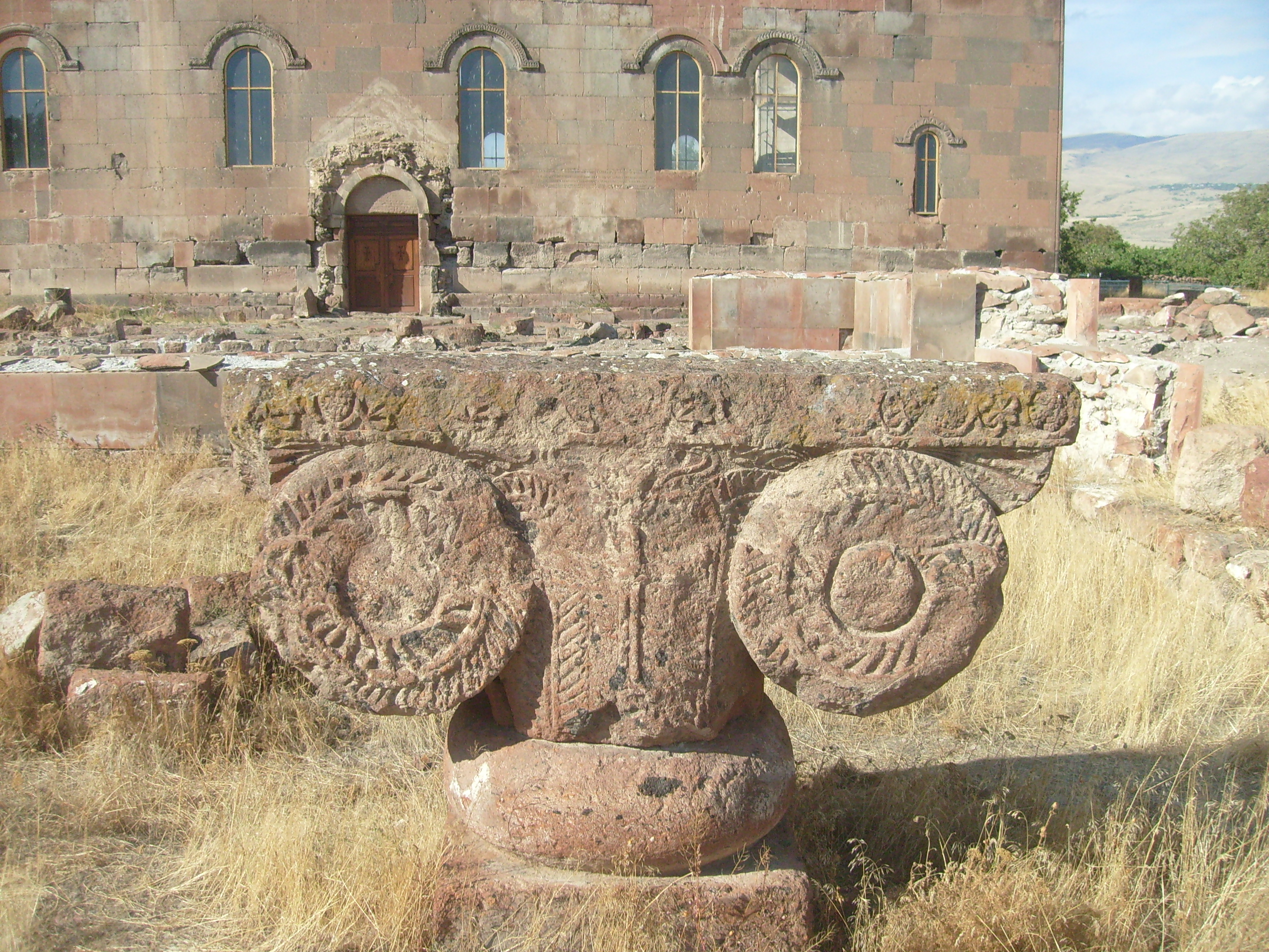 Արուճի եկեղեցական համալիր Ս. Գրիգոր (Արուճի կաթողիկե) 22/8